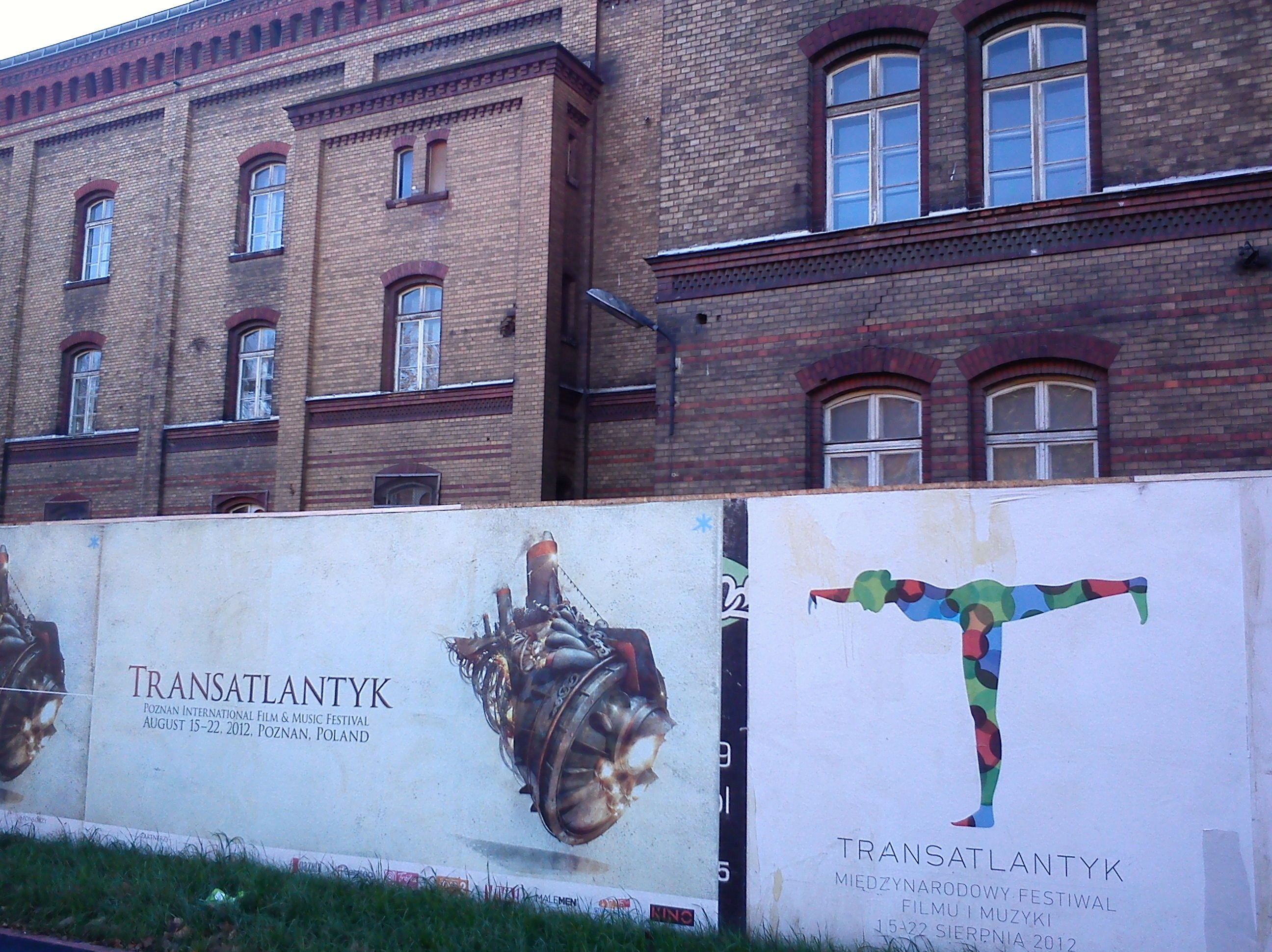 Plakaty festiwalu Transatlantyk, Poznań, 2012, ul. Bukowska.